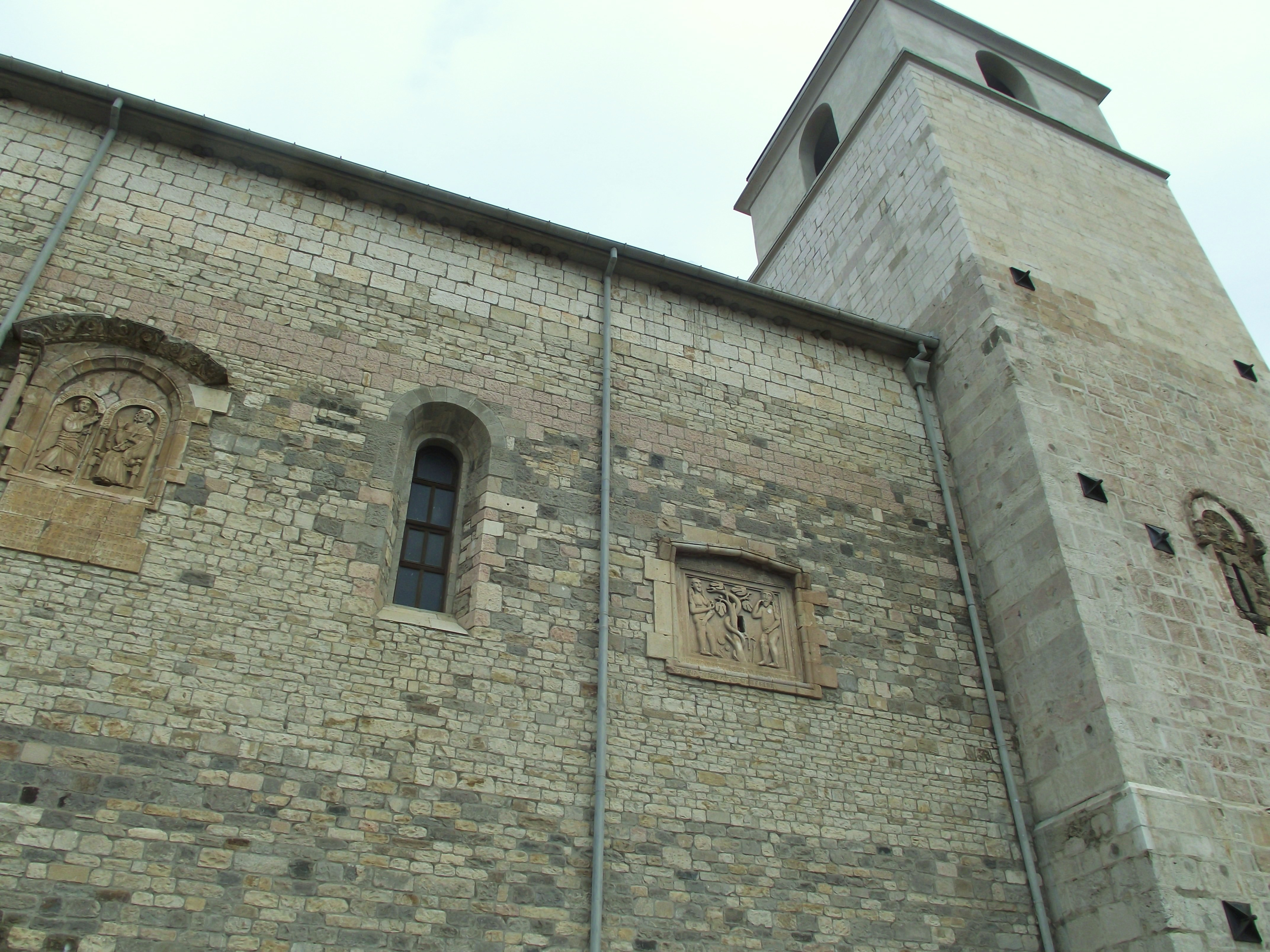 fianco destro del Duomo di Rapolla